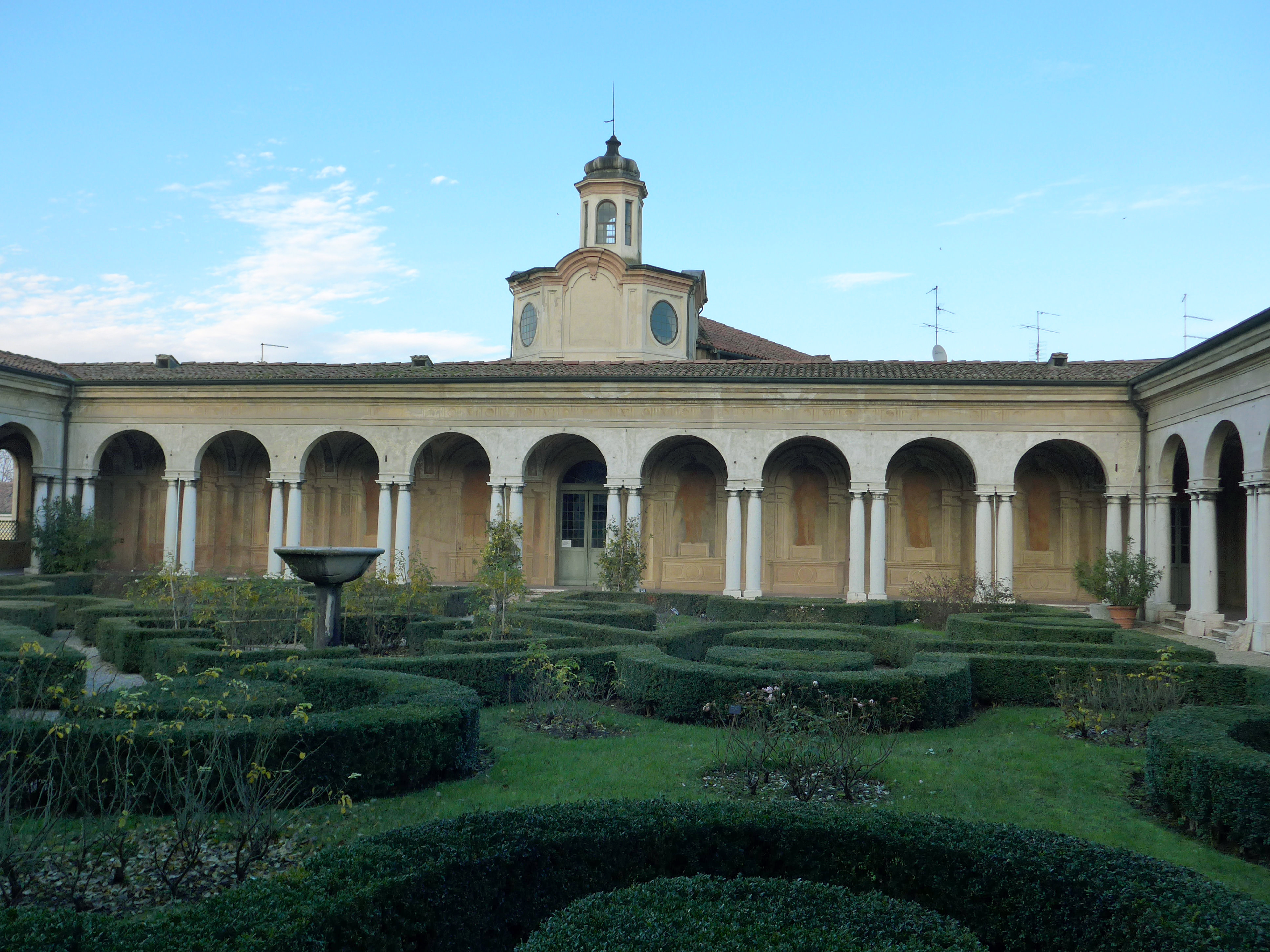 Mantua Ducal palace, hanging garden.